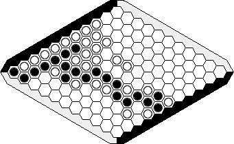 Diagrama creado inicialmente para el artículo de Wikipedia sobre el juego de tablero hex. Una alternativa es emplear el de la Wikipedia inglesa. Untrozo 19:16 7 abr, 2004 (CEST)